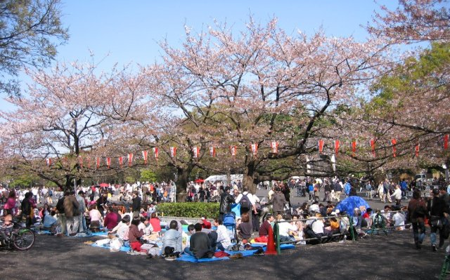 Kirschblütenfest im Uenopark, Tokyo 2003